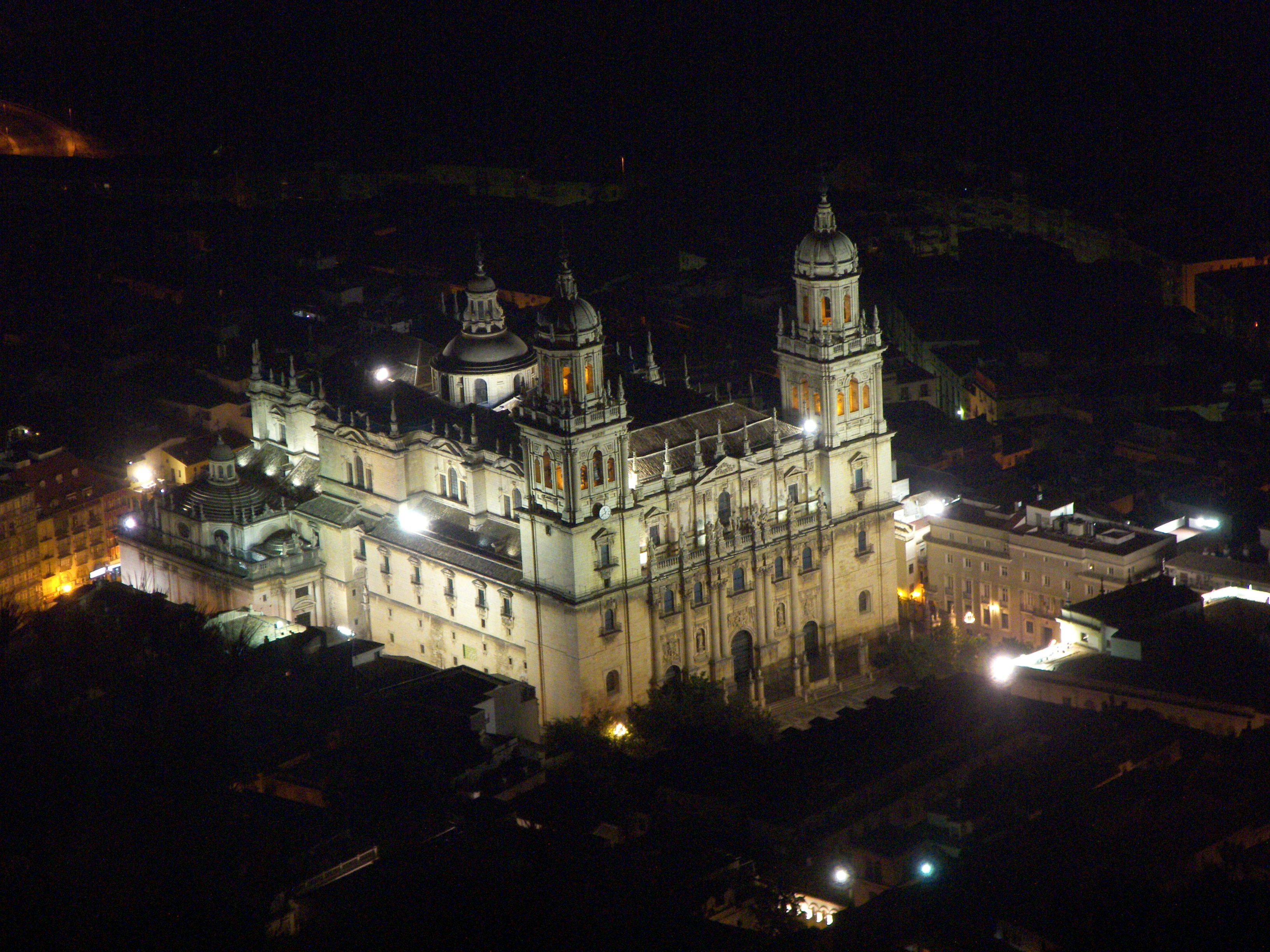 Catedral de Jaén de noche, desde el Castillo de Santa Catalina.